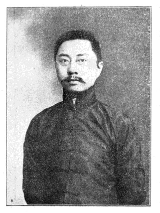 中文（台灣）: 中華民國國會議員